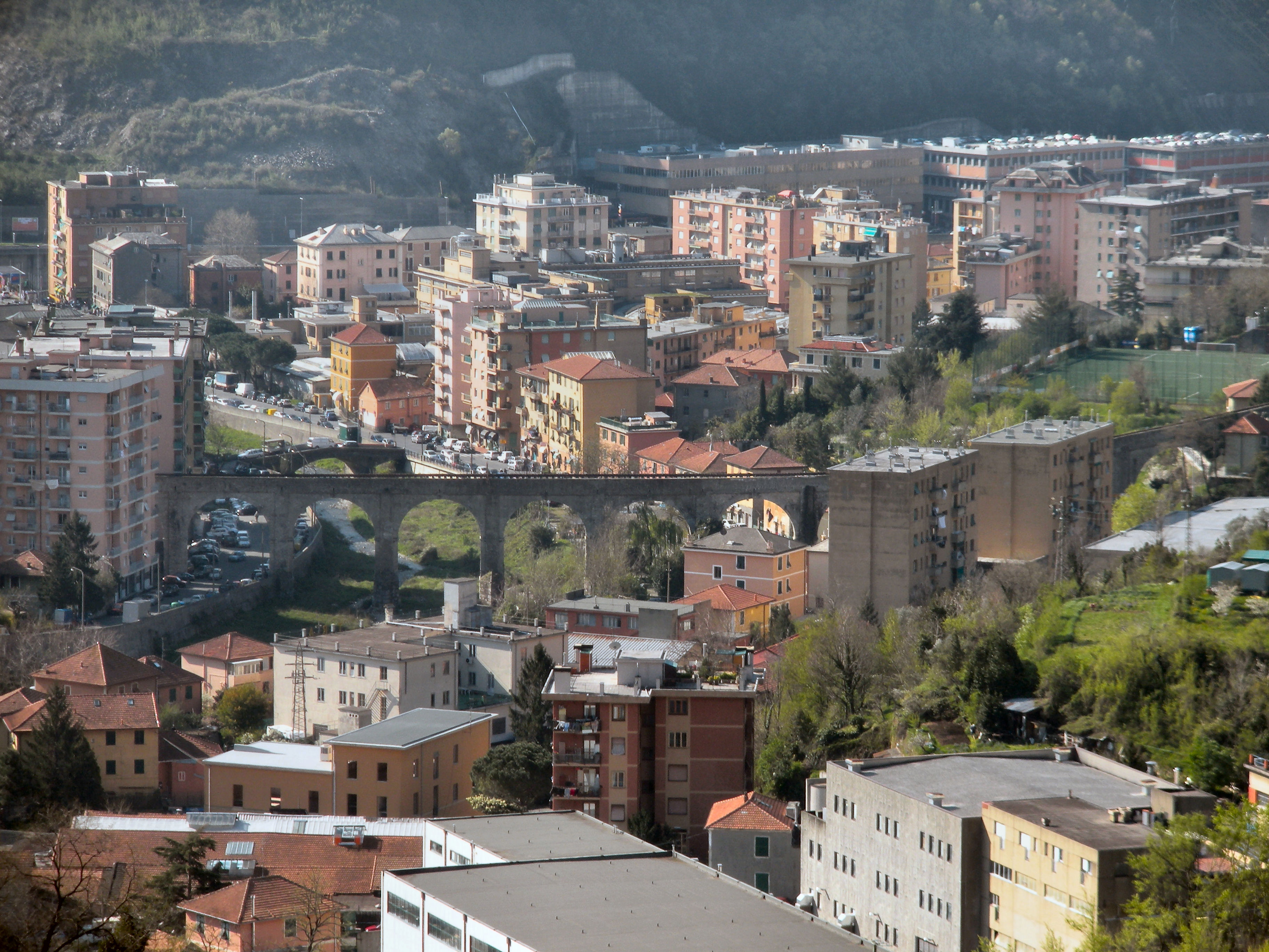 Panorama di Molassana (quartiere di Genova)